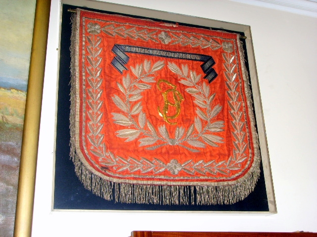 Eksponaty Instytutu im. Sikorskiego w Londynie